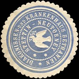 Sealing stamp Title: Diakonissen - und Krankenhaus Bethanien - Stettin - Neutorney Description: hellblau, weiß, geprägt Place: Stettin size: 4 cm